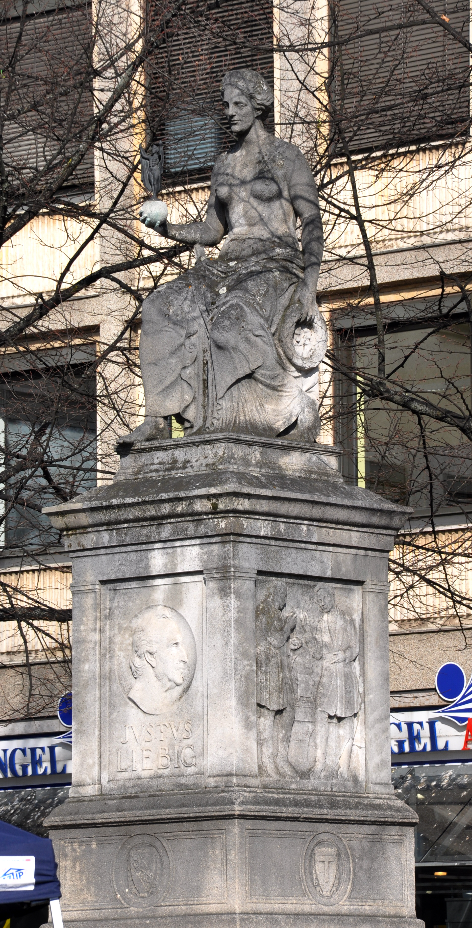 Darmstadt, Luisenplatz, Justus-Liebig-Denkmal von 1913, mit einer Engel-Apotheke im Hintergrund